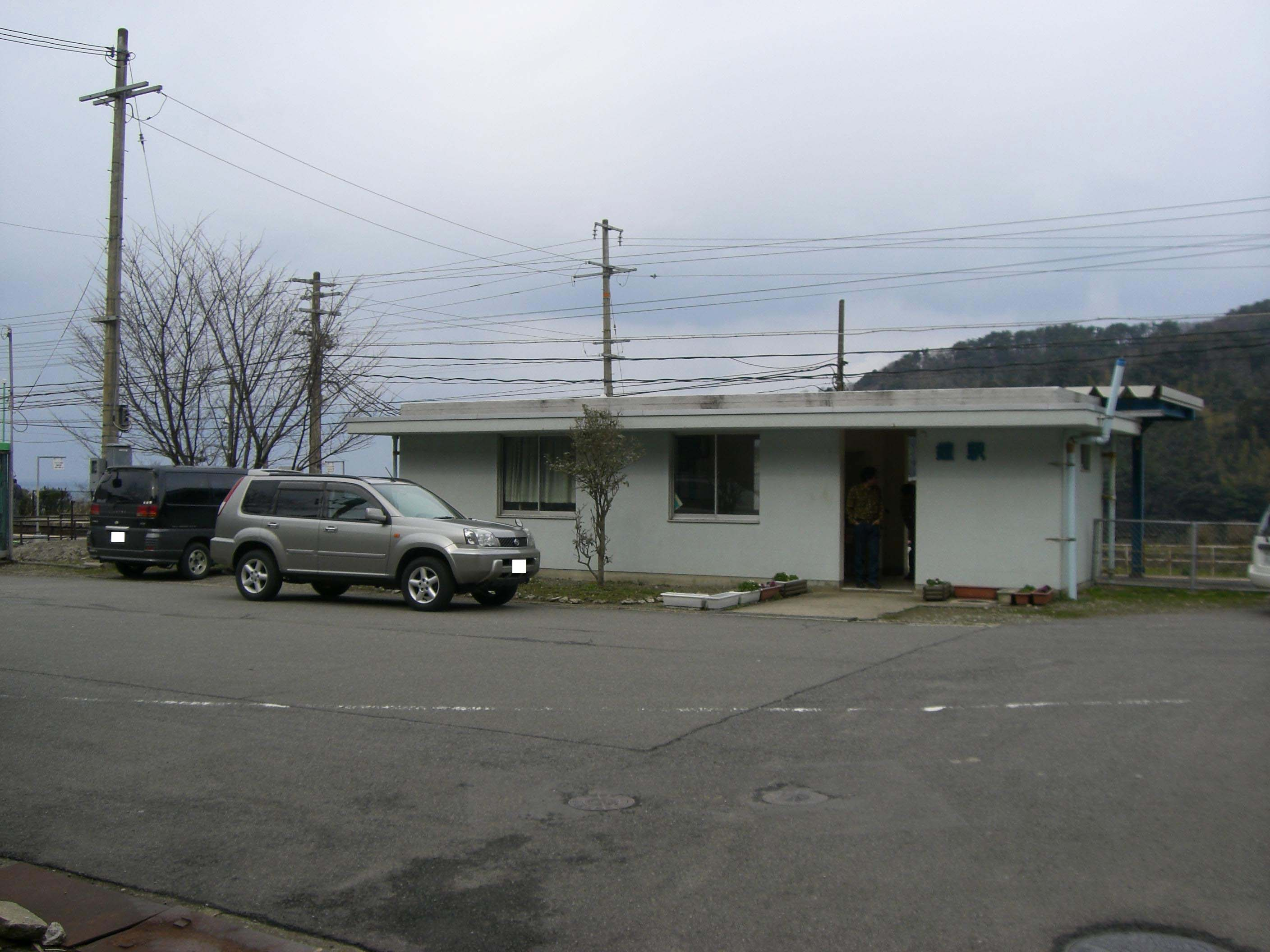 鎧駅の駅舎